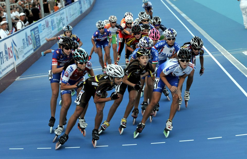 Prueba en el marco del Campeonato Mundial de Patinaje, Italia 2012